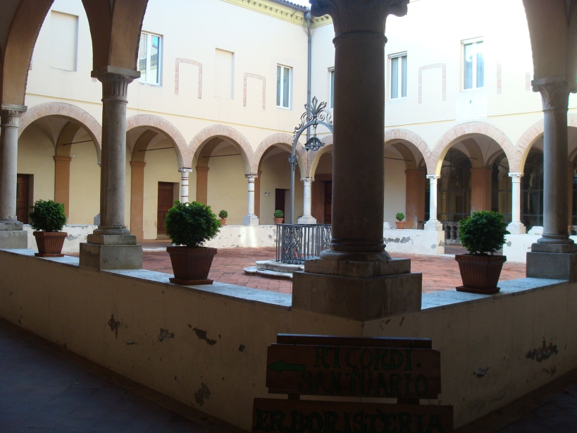 Madonna del Monte di Cesena (Italie), le petit cloître avec son puits de fer